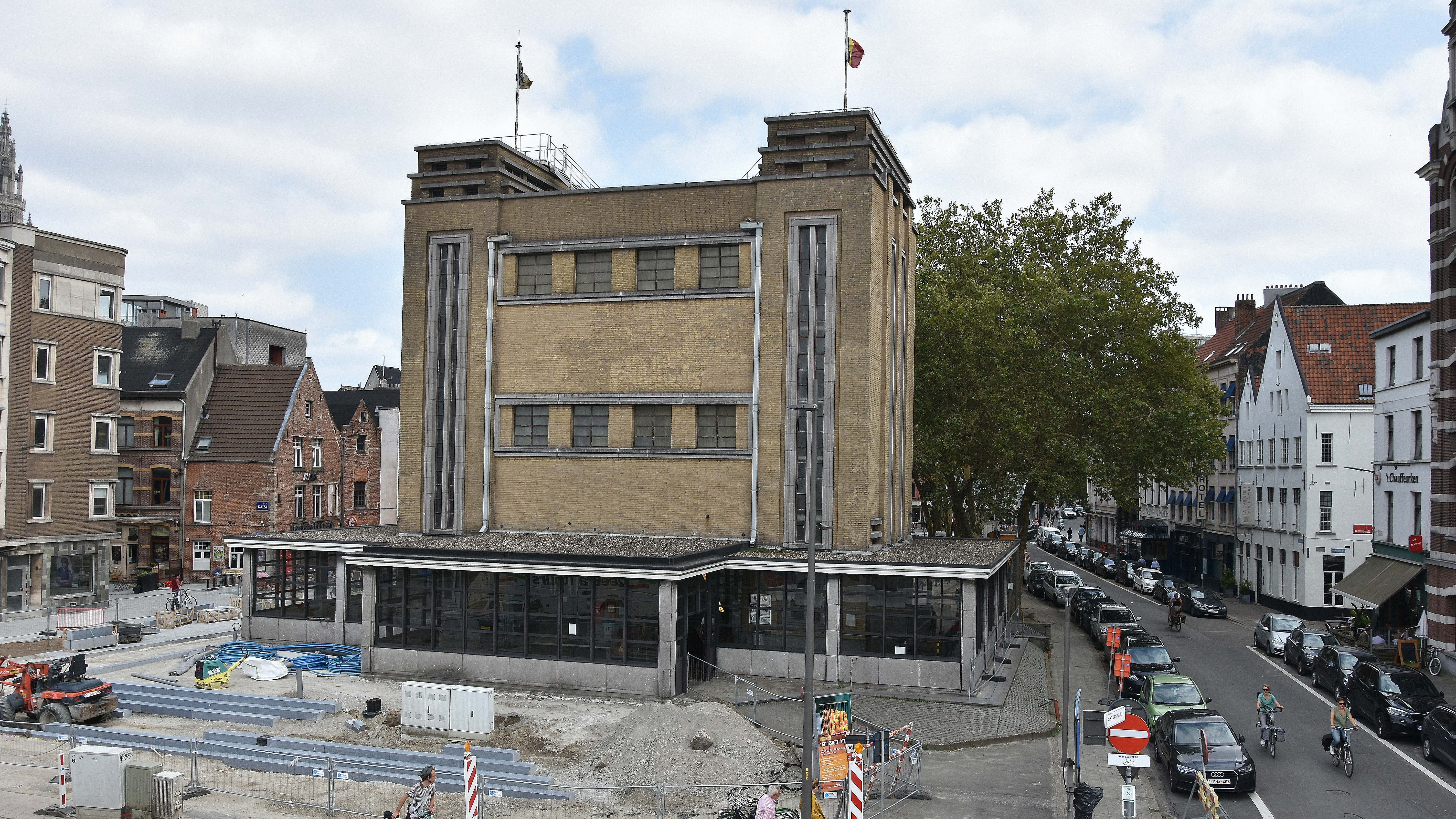 Sint-Annatunnel toegangsgebouw rechteroever Antwerpen 19-08-2018 14-53-25 This photo of immovable heritage has been taken in the Flemish Region